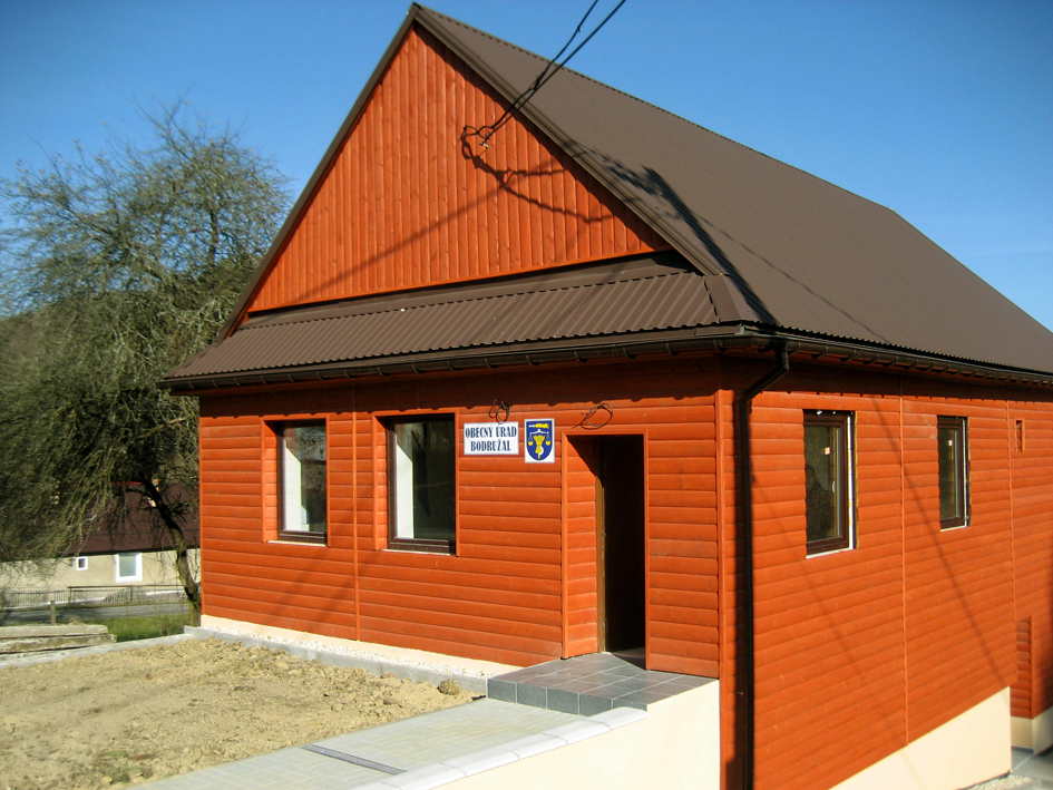 Nová budova Obecného úradu v Bodružali